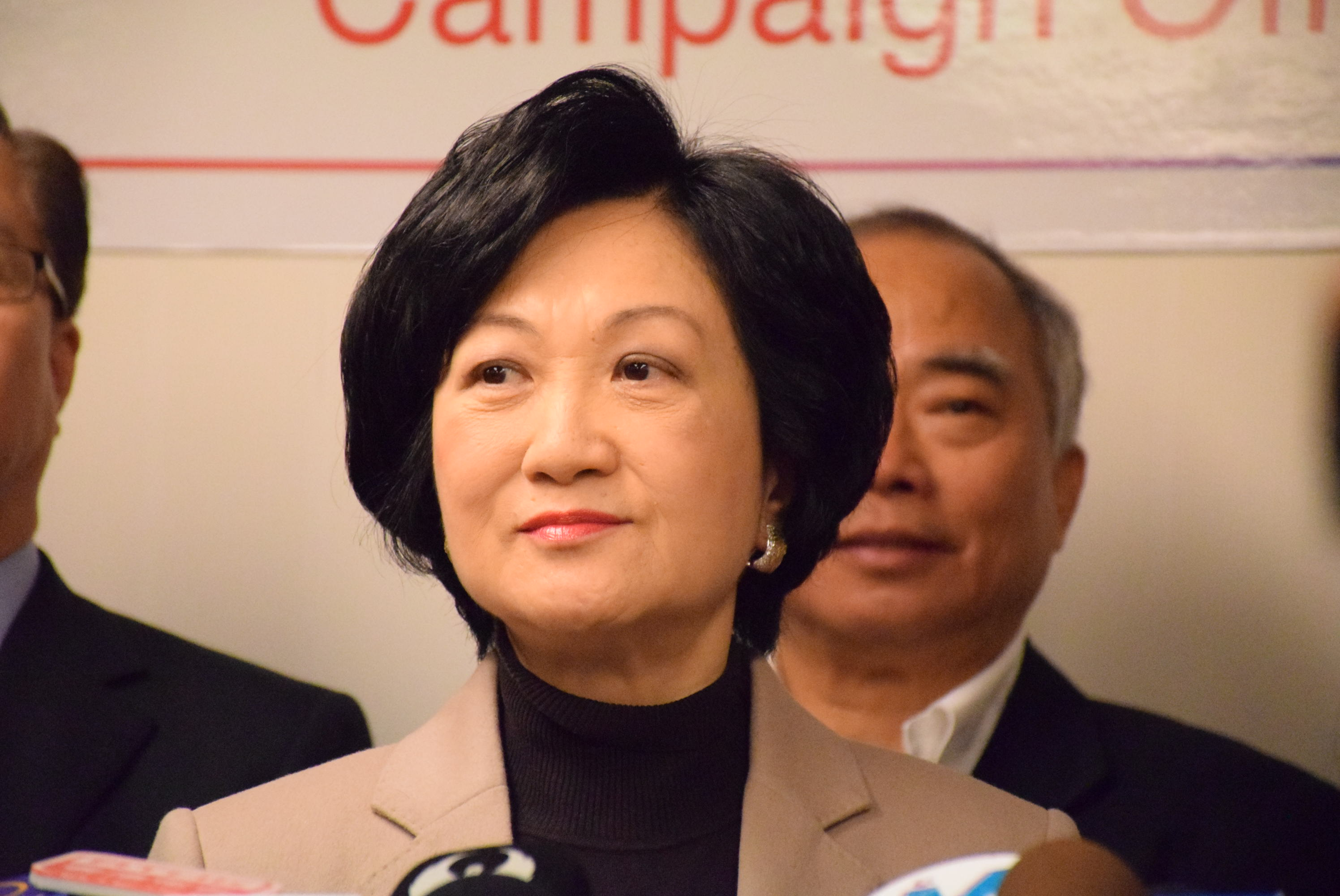 中文（香港）: 香港特首參選人葉劉淑儀。（美國之音湯惠芸攝）